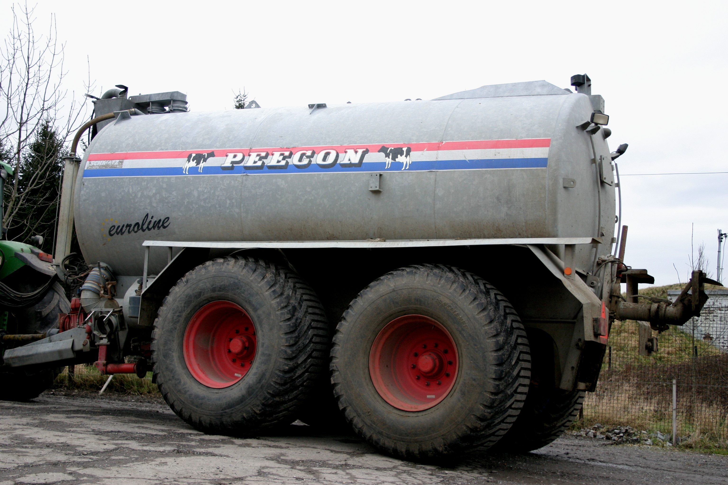 E modernt Drock-Pifffaass, Peecon euroline